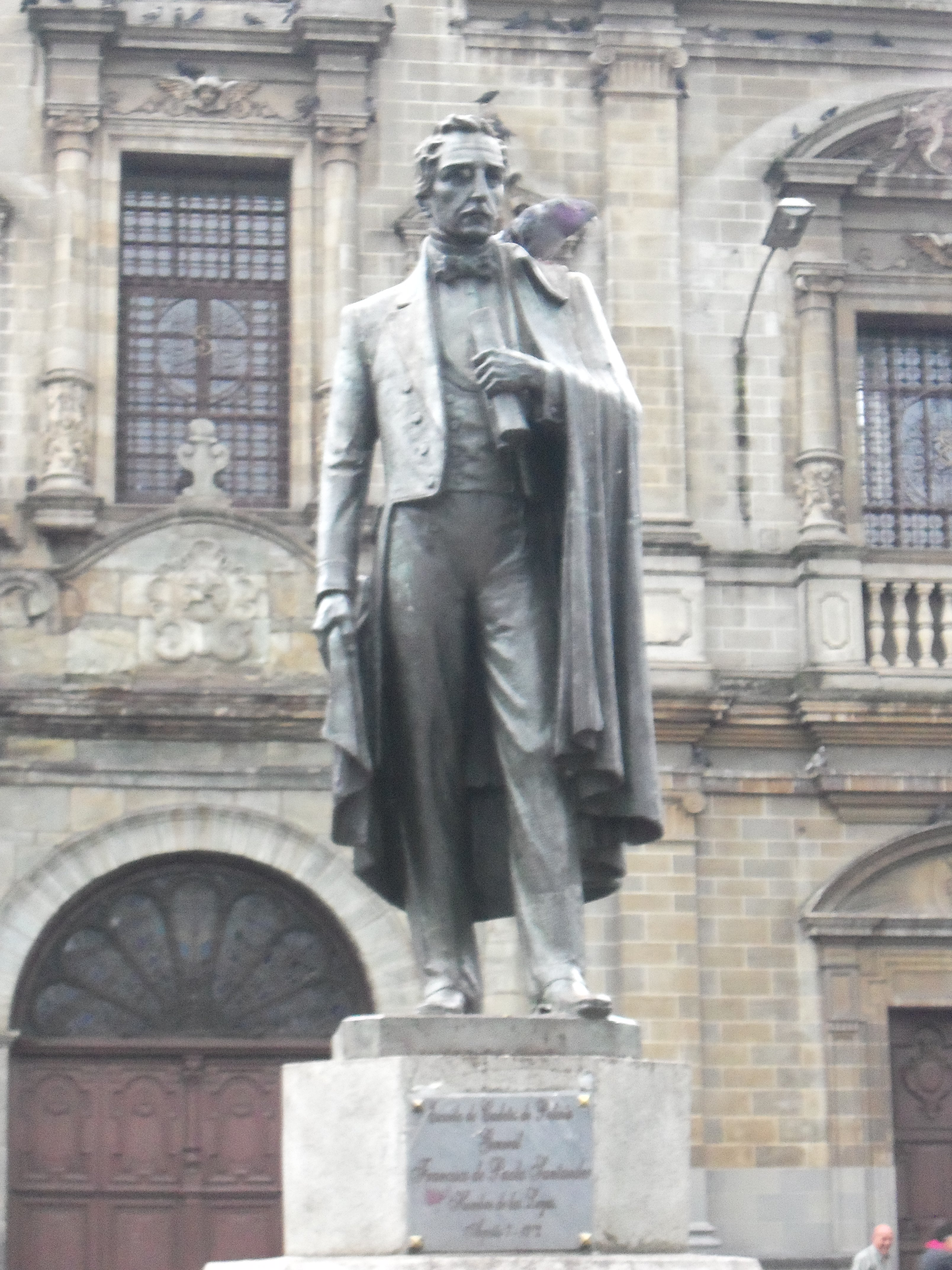 Estatua de Francisco de Paula Santander en la plazuela San Ignacio, La Candelaria, Medellín, Antioquia, Colombia.